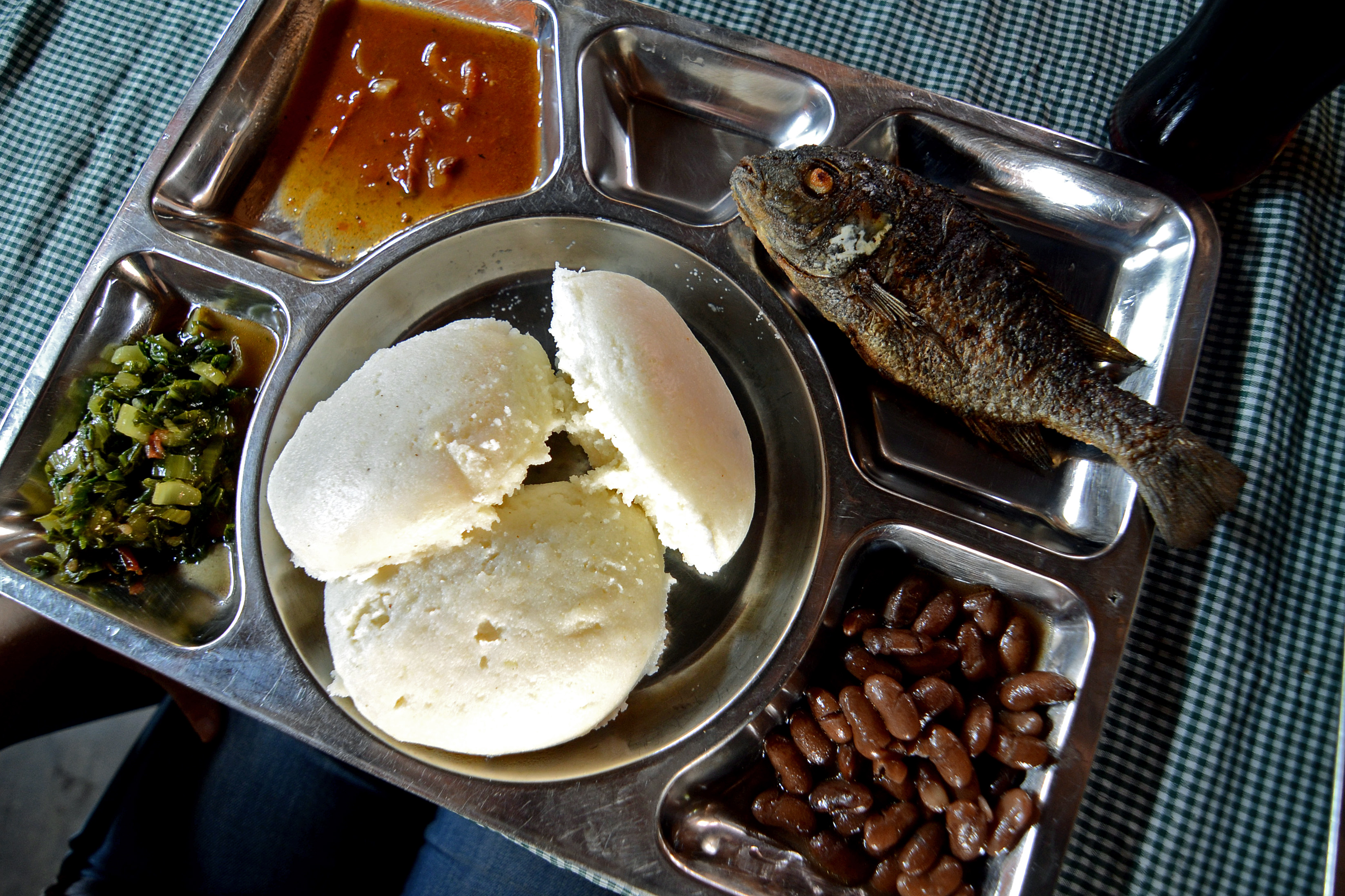 at Silver Spoon, Lilongwe, Malawi